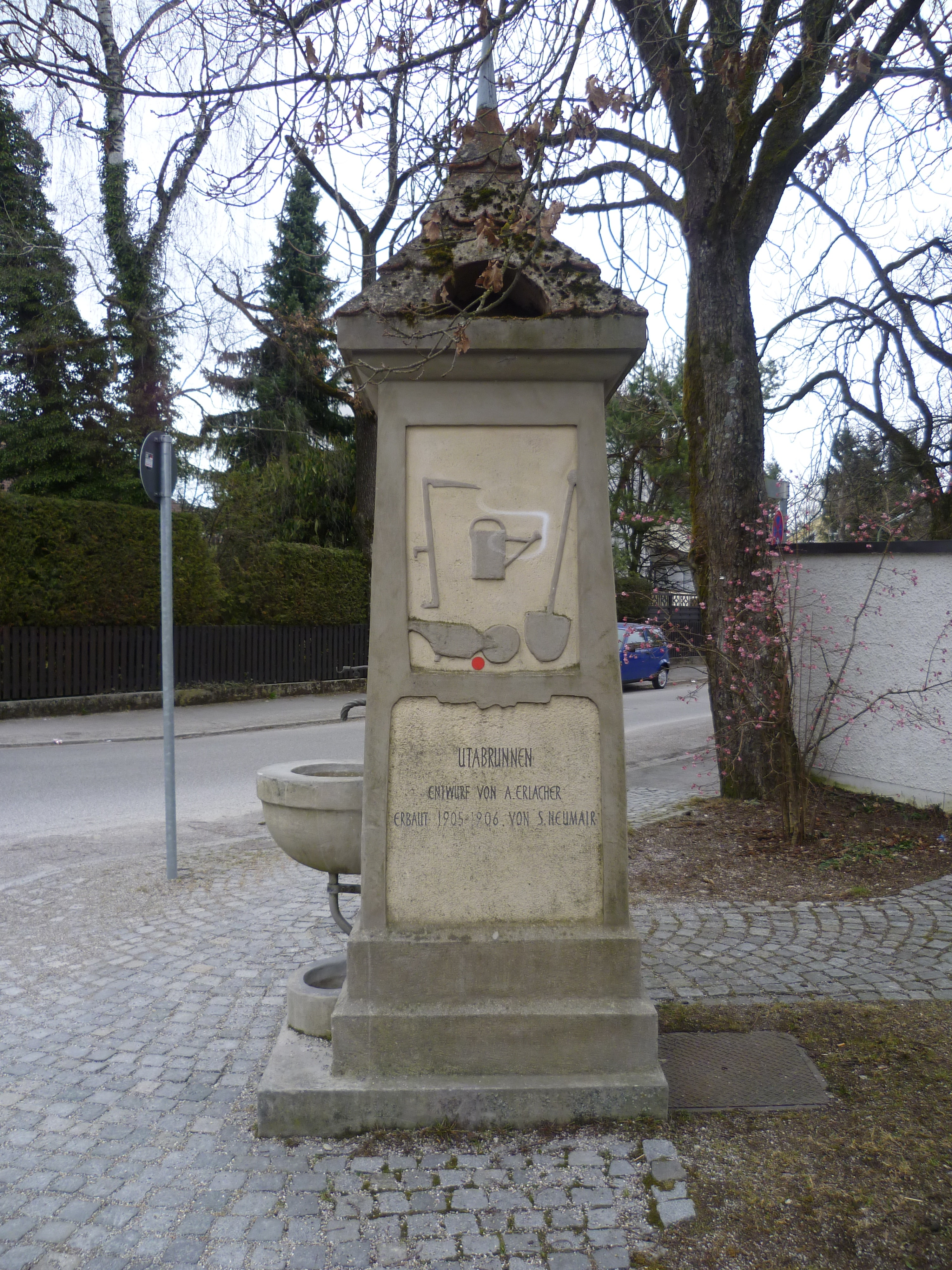 Uta-Brunnen, Waldtruderinger Straße, München-Waldtrudering